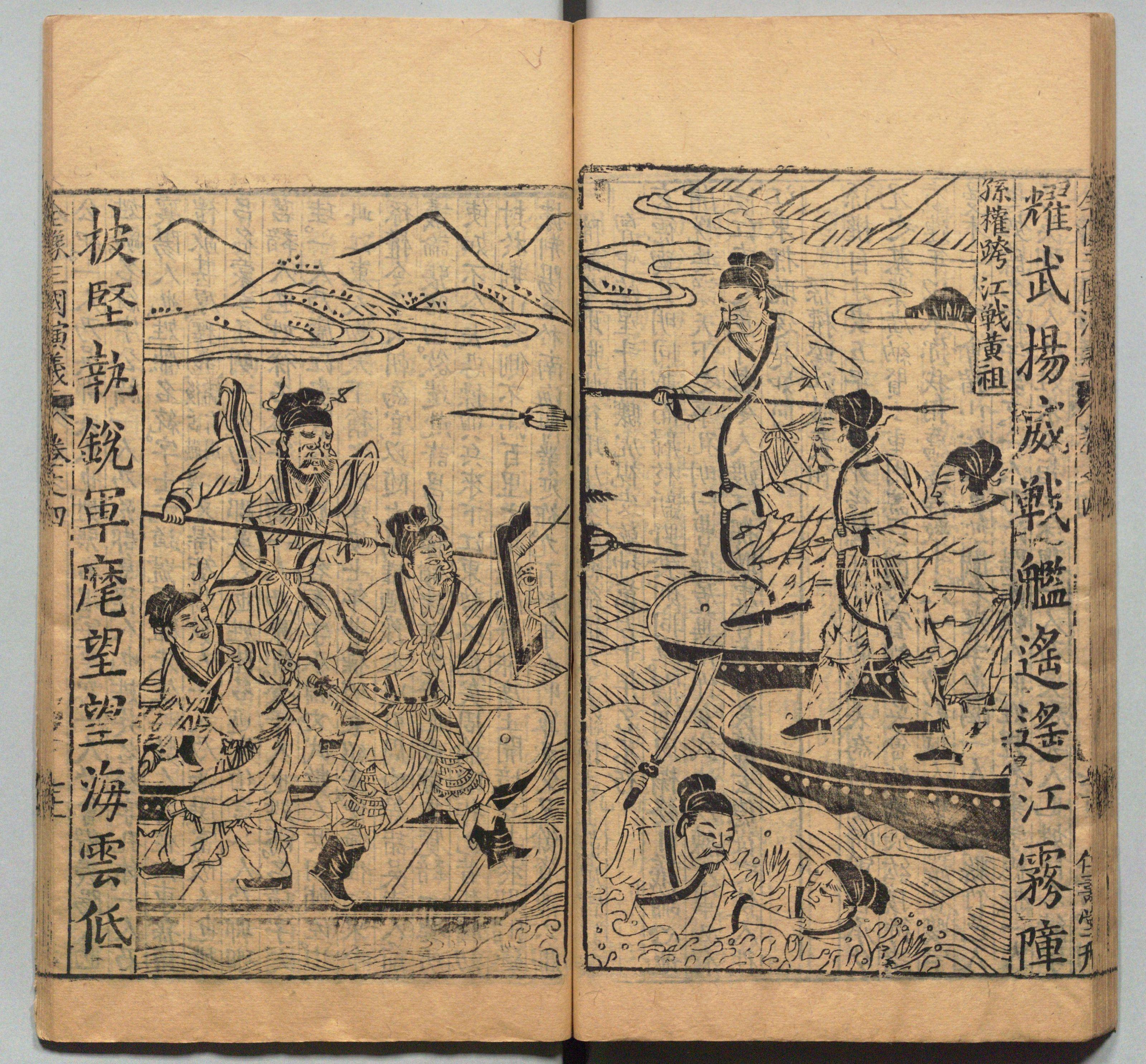 新刊校正古本大字音释三国志通俗演义 明万历十九年书林周曰校刊本